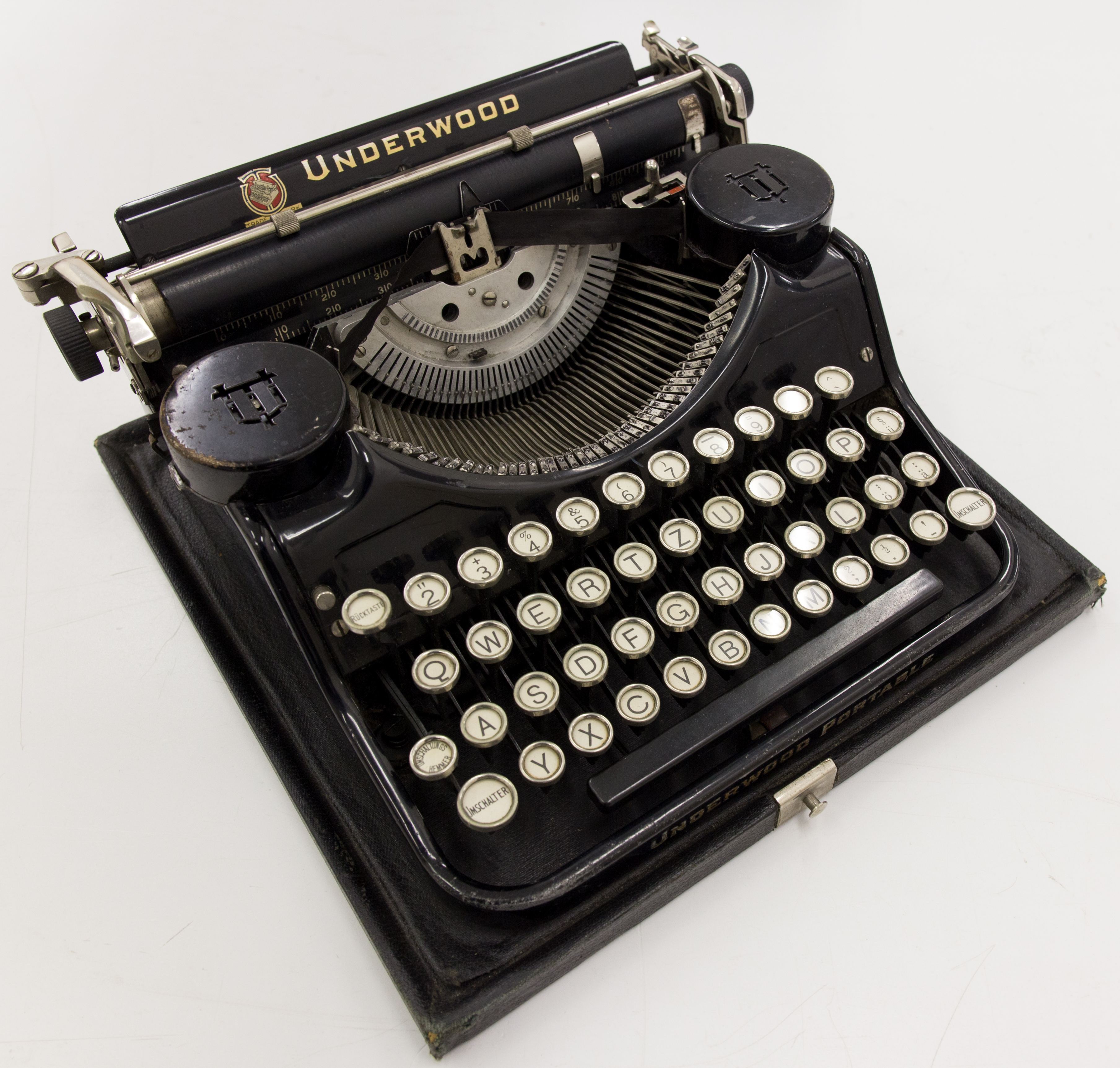 Reise-SchreibmaschineUnderwood Portable Indetifikations-Nr.: N (9 A) 105/2014 Datierung: 1930-1936 Herstellungsort: Bridgeport, Connecticut, USA Körperschaft: Underwood Elliott Fisher Company, USA, Hersteller Höhe x Breite x Tiefe: 15 x 32 x 32 cm mit Deckel Höhe x Breite x Tiefe: 14 x 30 x 30 cm ohne Deckel Ausgabe: Holz, Metall Beschreibung: Schwarze Reise-Schreibmaschine der Firma Underwood Elliott Fisher Company mit schwarzem Deckel. Die Schreibmaschine ist auf der Rückseite beschriftet „Underwood Typewriter Company/ Protected by United States and foreign patents/ Manufactured in Bridgeport, Conn., USA/ Product of Underwood Elliott Fisher Company“. Schreibmaschine mit Serien-Nr.: 520468 und Garantieschein auf der Innenseite des Deckels.